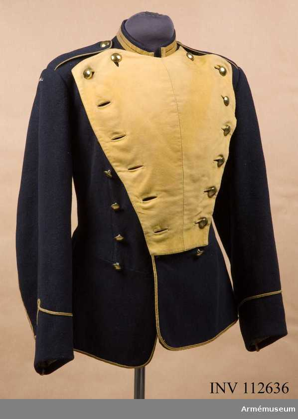 Vapenrock m/1875 för manskap vid Skånska dragonregementet. Armémuseums inventarienummer: 112636